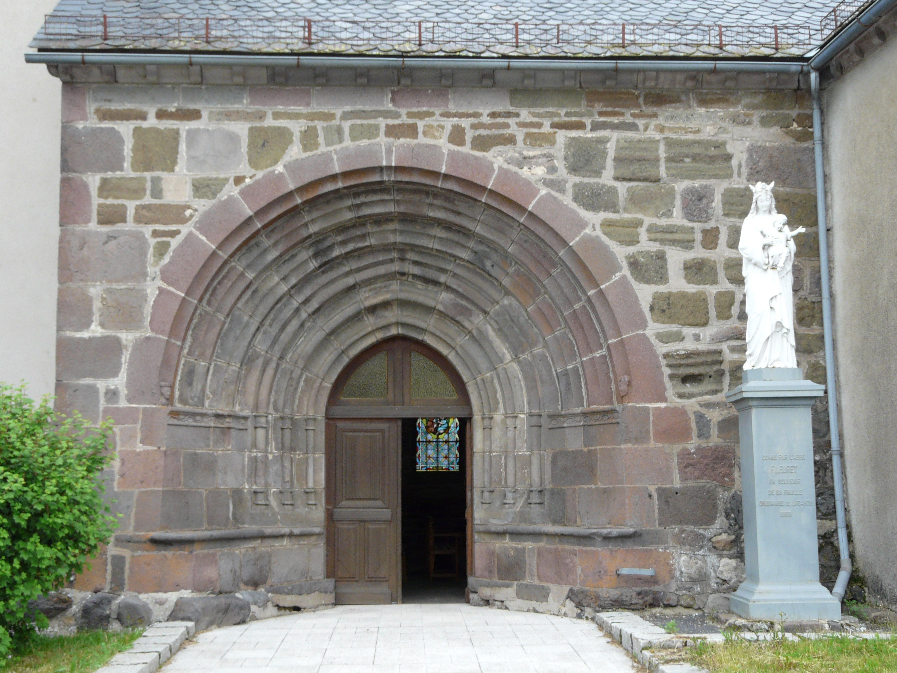 Le portail de l'église, Lugarde, Cantal, France.